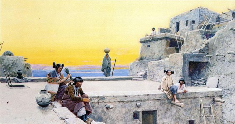 Hopi people.